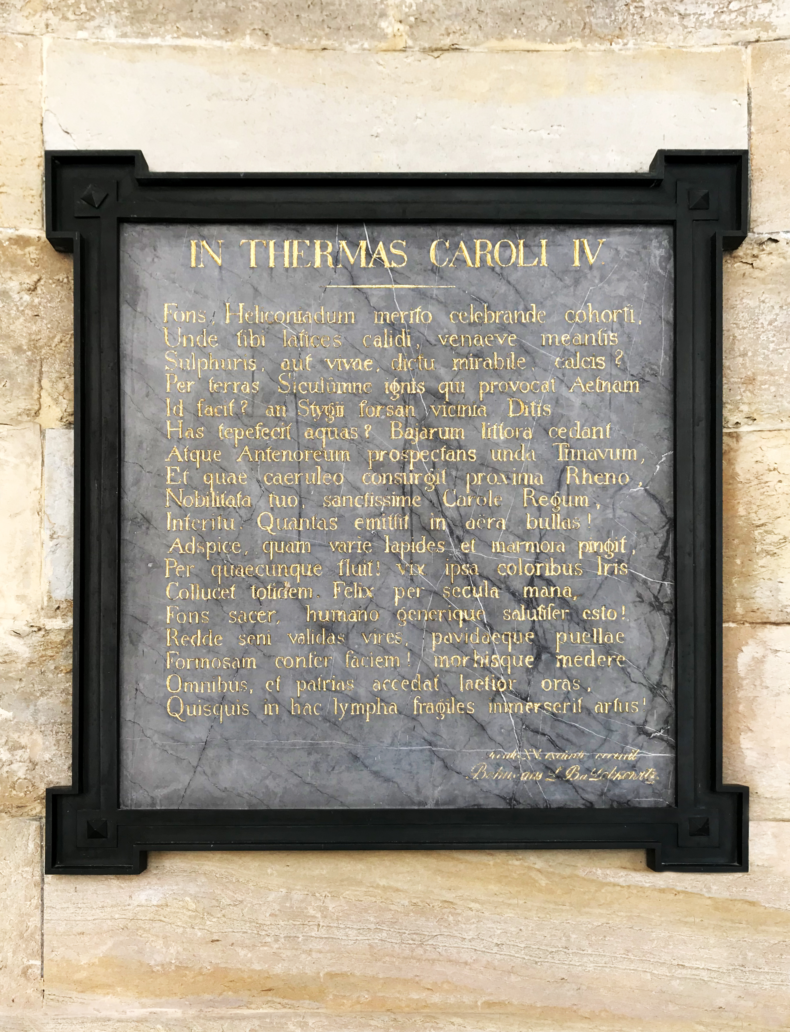 Deska s latinským textem "In Thermas Caroli IV" u Mlýnského pramene v Karlových Varech, text Bohuslava Hasištejnského z Lobkovic